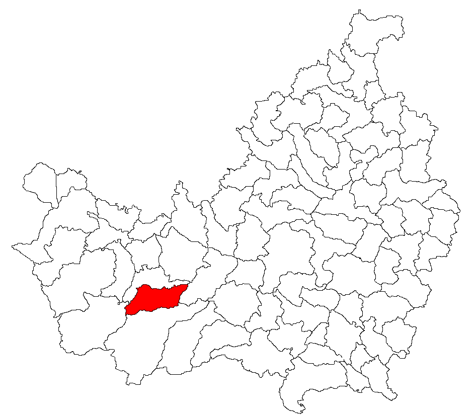 Categorie:Hărţi ale judeţului Cluj